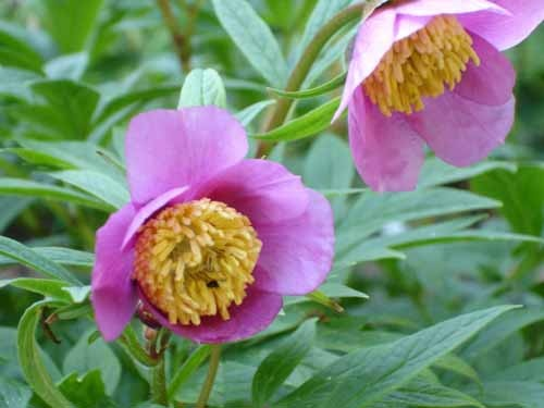 Paeonia anomala subsp. veitchii